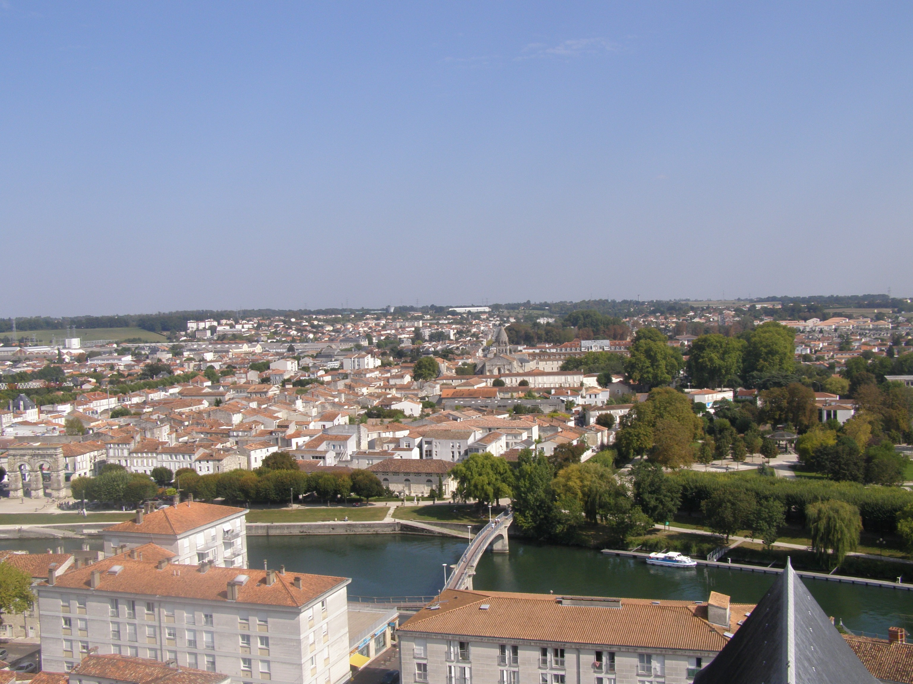 Panorama sur Saintes